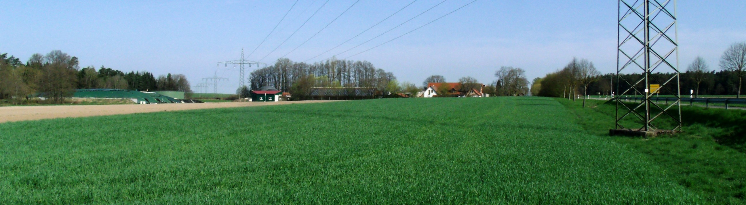 Bauzenweiler, Ortsteil von Leutershausen im Landkreis Ansbach